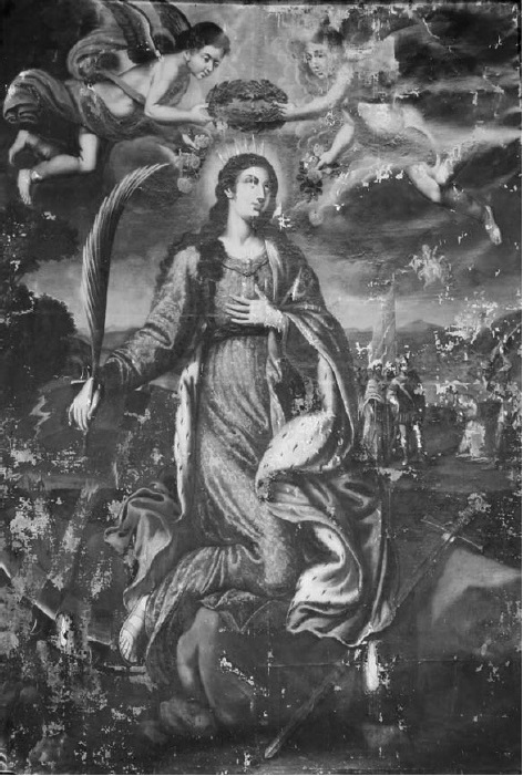 La obra representa a la mártir Santa Catalina de Alejandría.